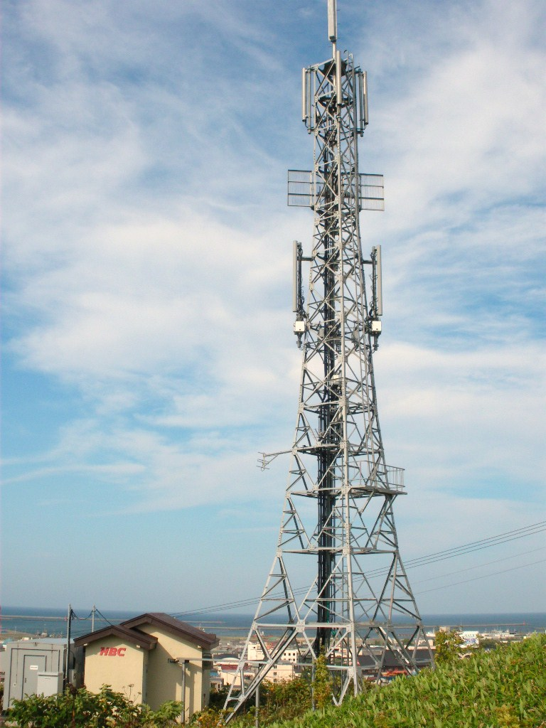 HBC稚内・稚内緑町アナログテレビ中継局 2011年7月24日を以って廃止